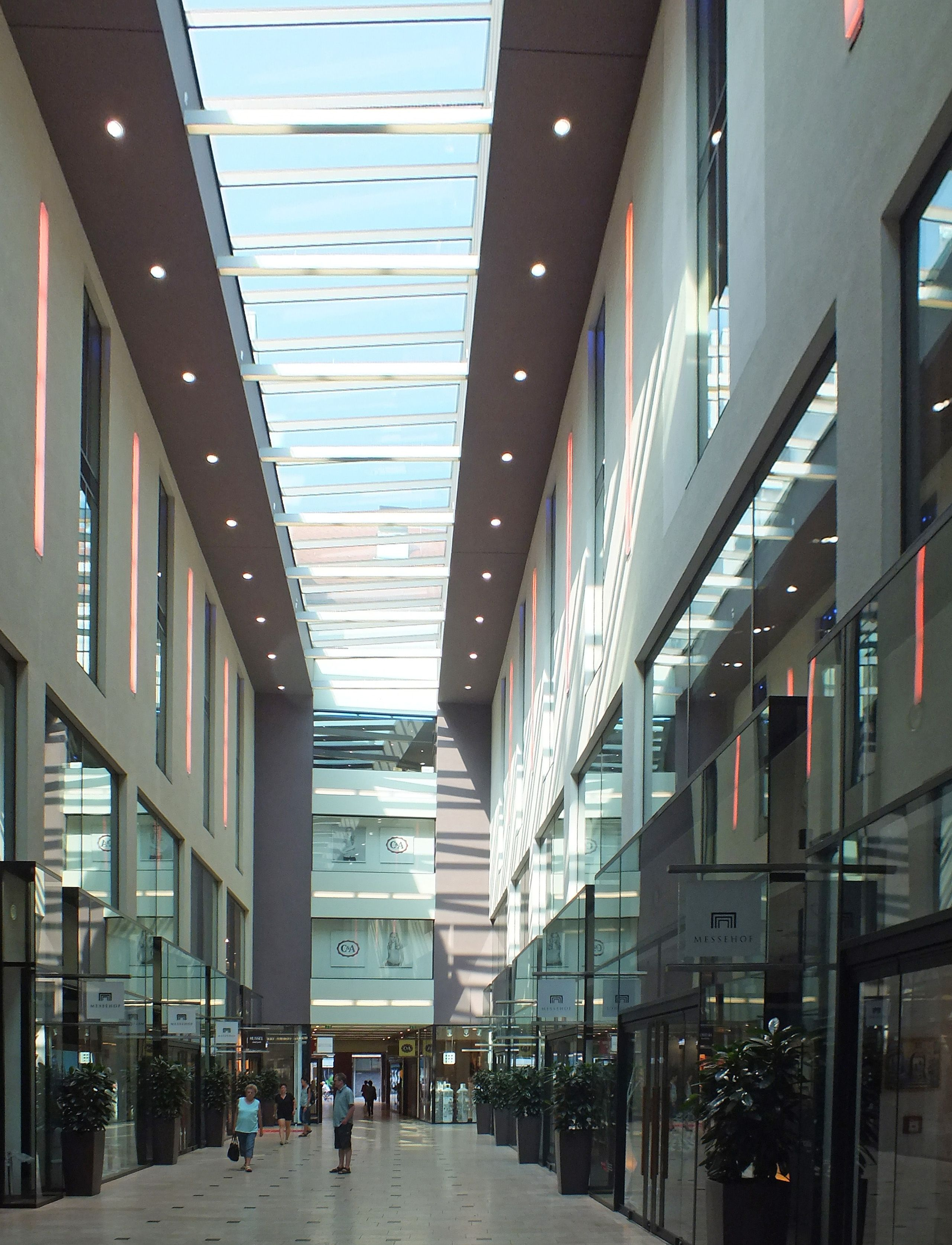 Die Messehofpassage nach ihrem Umbau, nun mit Tageslicht